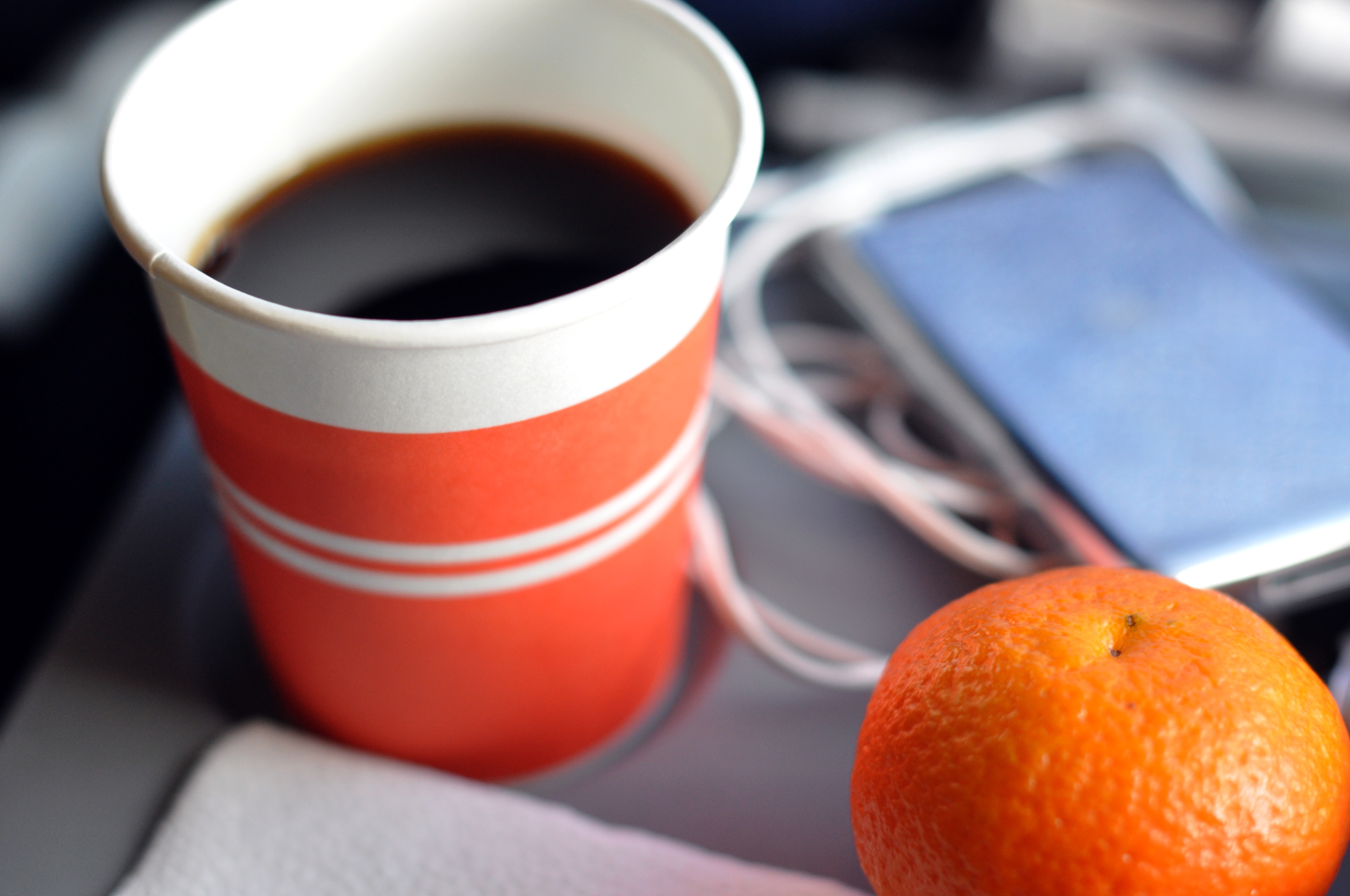 Kaffe og mandarin